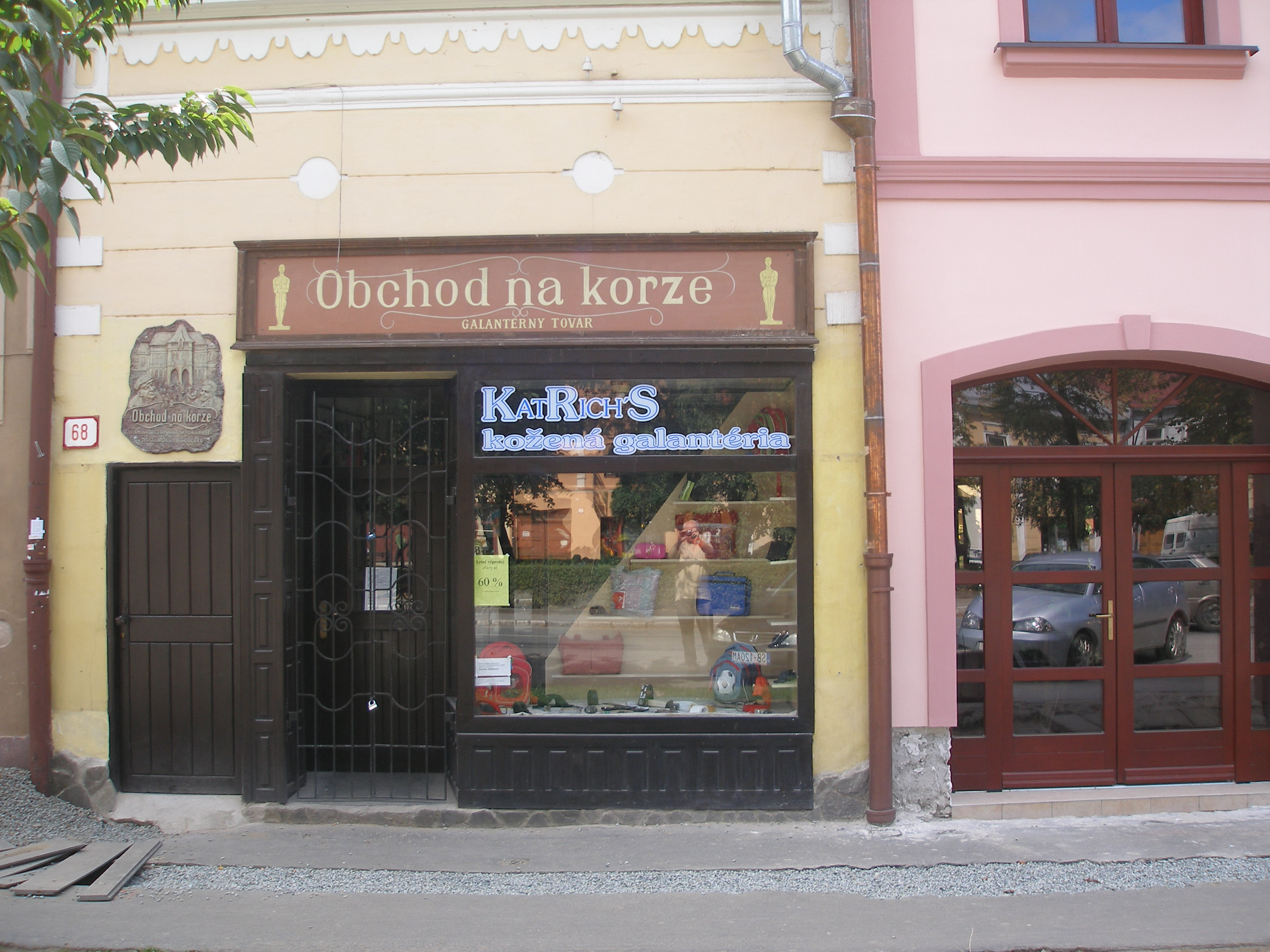 Sabinov starobylé bývalé slobodné kráľovské mesto na Slovensku. Dnes okresné mesto v regióne Šariš.